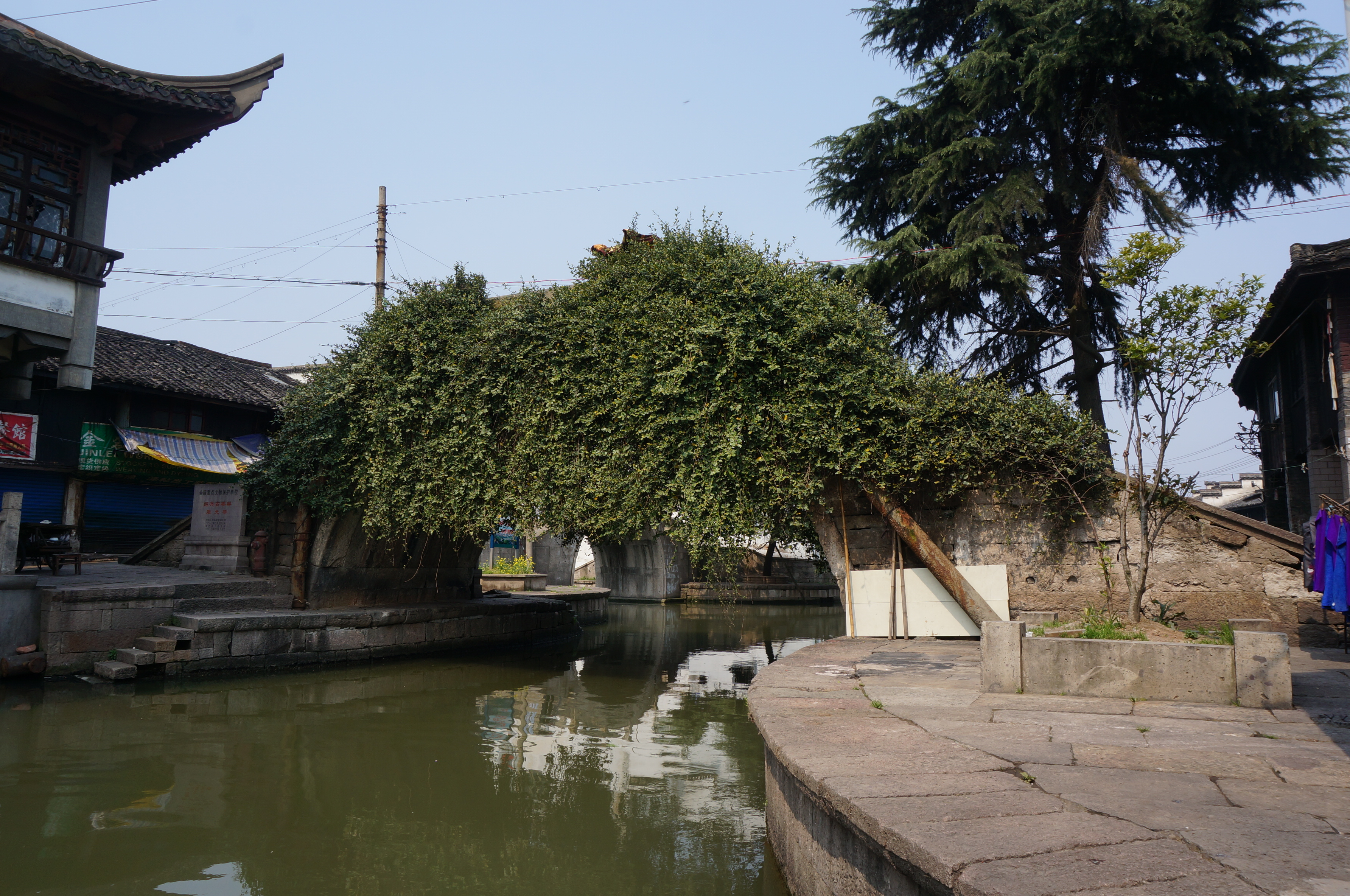 融光桥，东侧。